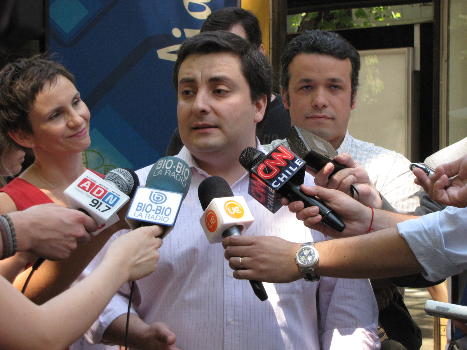 José Roa entrevistado por medios de comunicación.